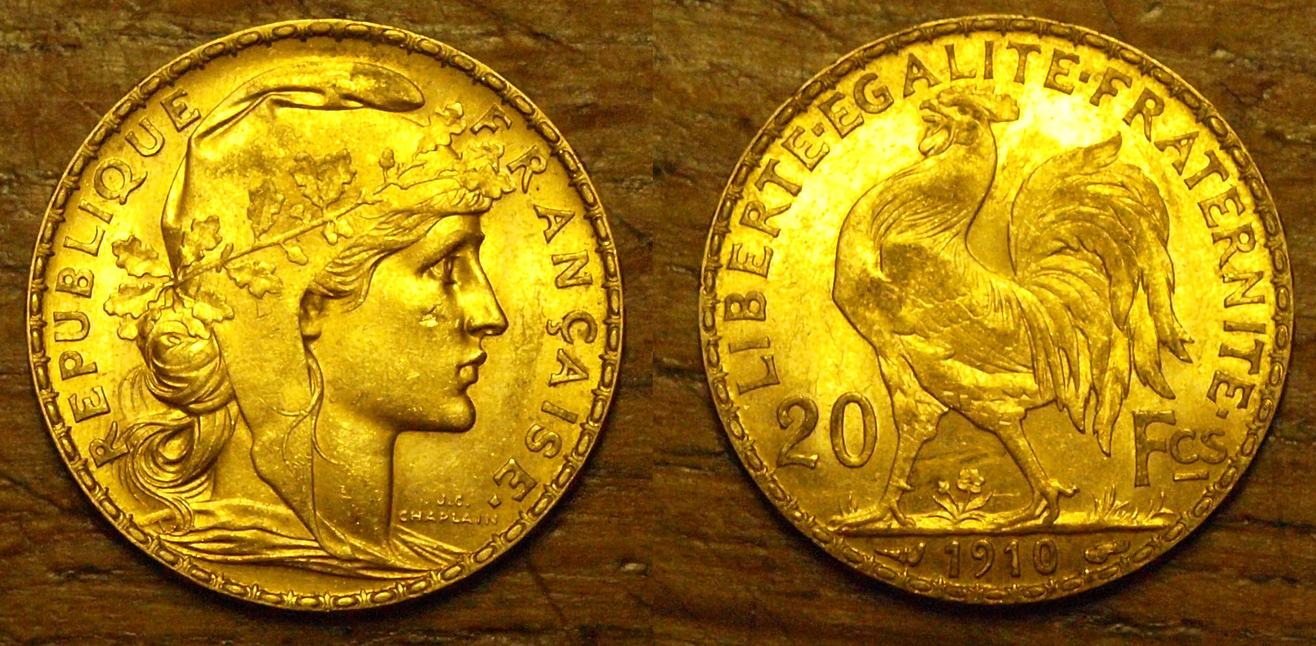 Marianne au coq de 20 francs, de 1910